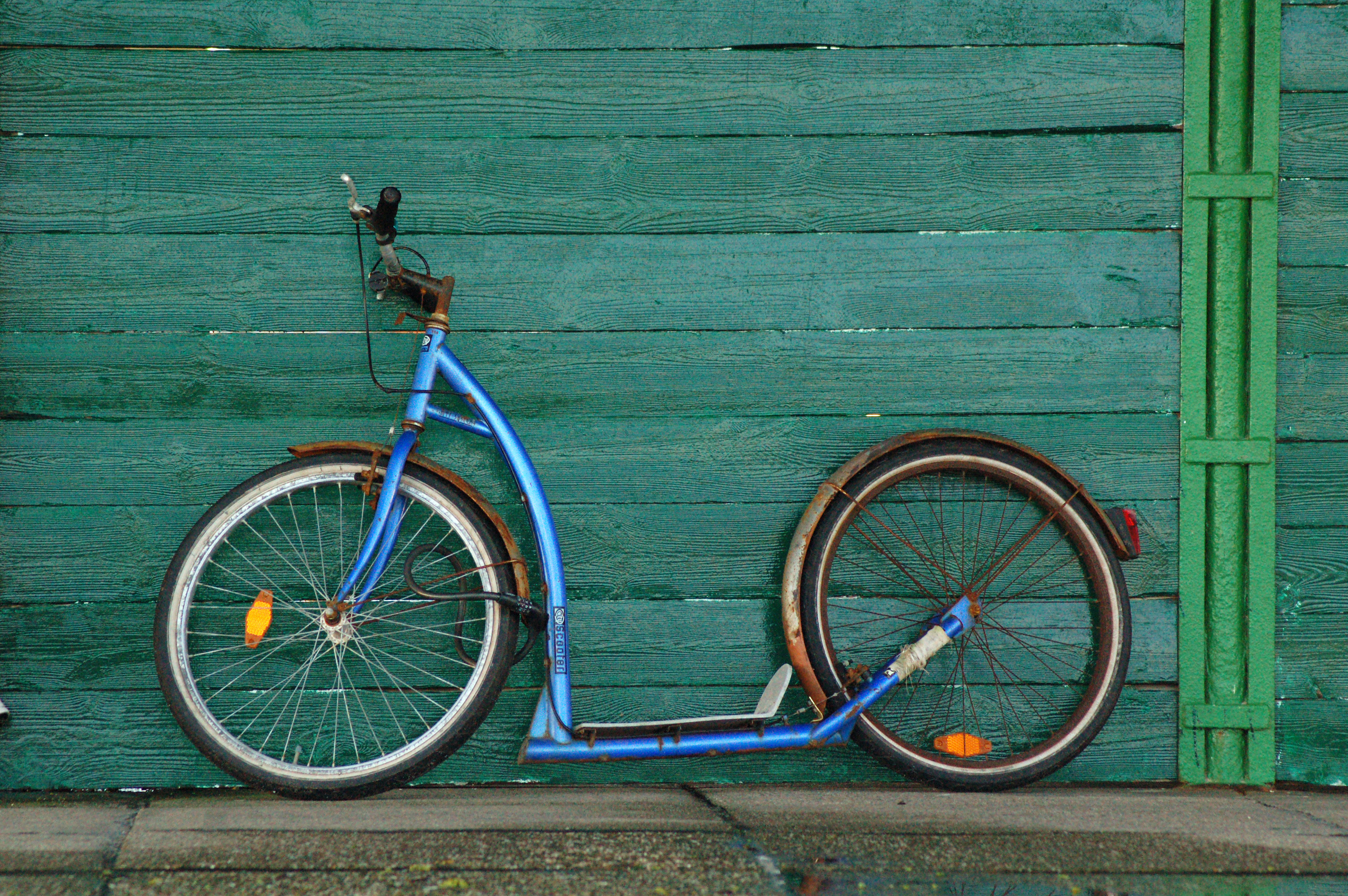 Typisch Helgoland: Tretroller, weil Fahrräder nicht erlaubt sind.